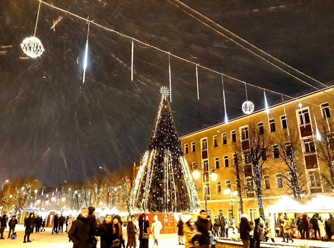 Вечір 2 грудня у Хмельницькому. Різдвяний ярмарок та сильний снігопад на площі перед кінотеатром ім.Шевченка Автор - Василь Камінський